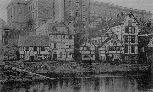 Die Fuhr und das Gebäude der Königlich-Preußischen Eisenbahndirektion in Elberfeld